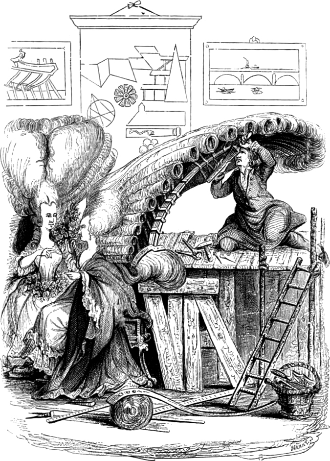 The “Académie de Coiffure”